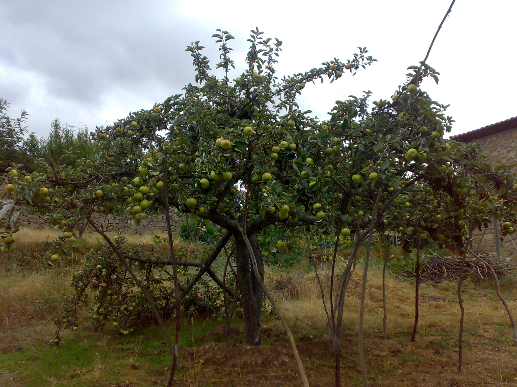 Manzano de la variedad reineta blanca (Navacepedilla de Corneja; Ávila; España)